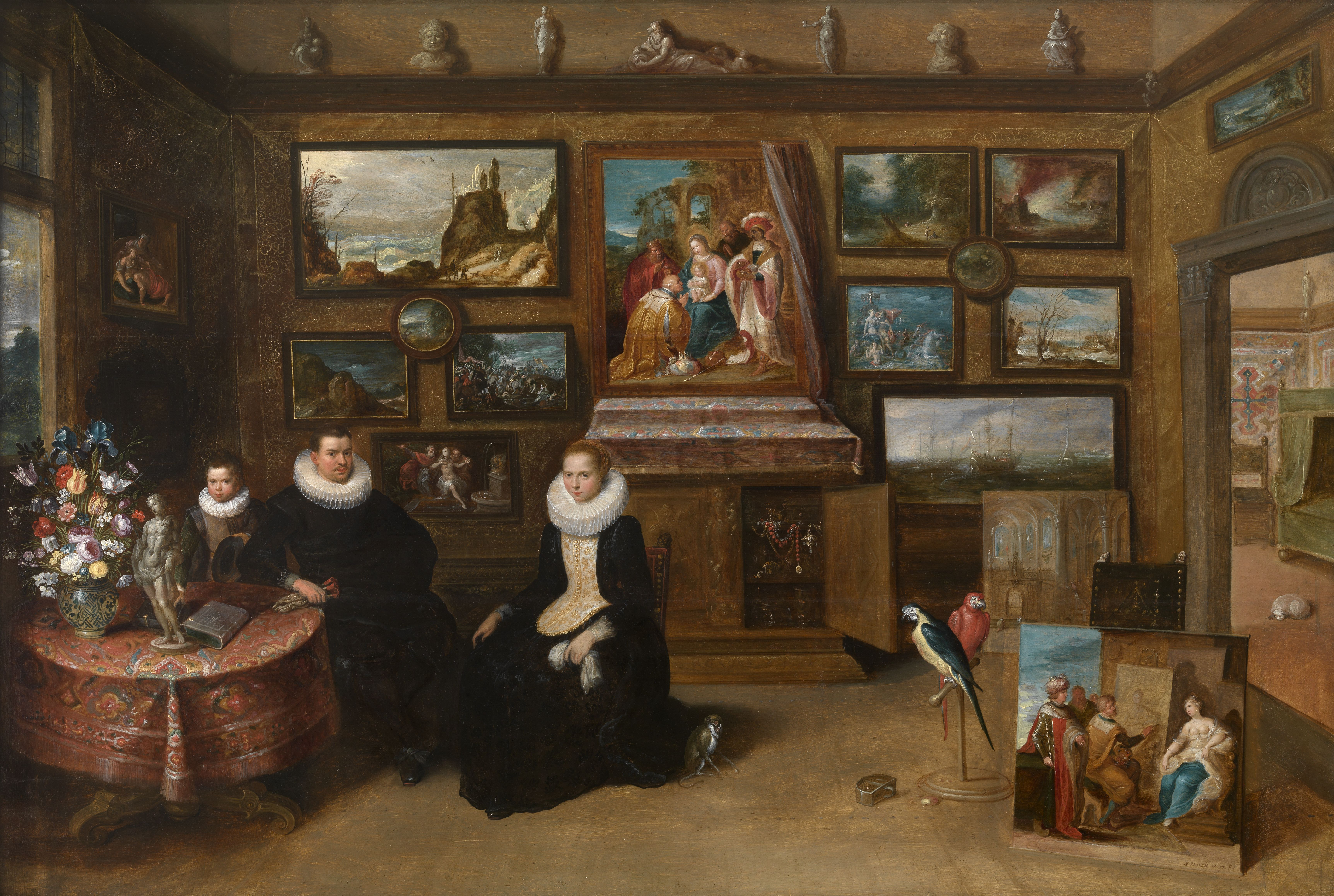 schilderij ( Frans Francken II( koninklijk museum voor schone kunsten antwerpen